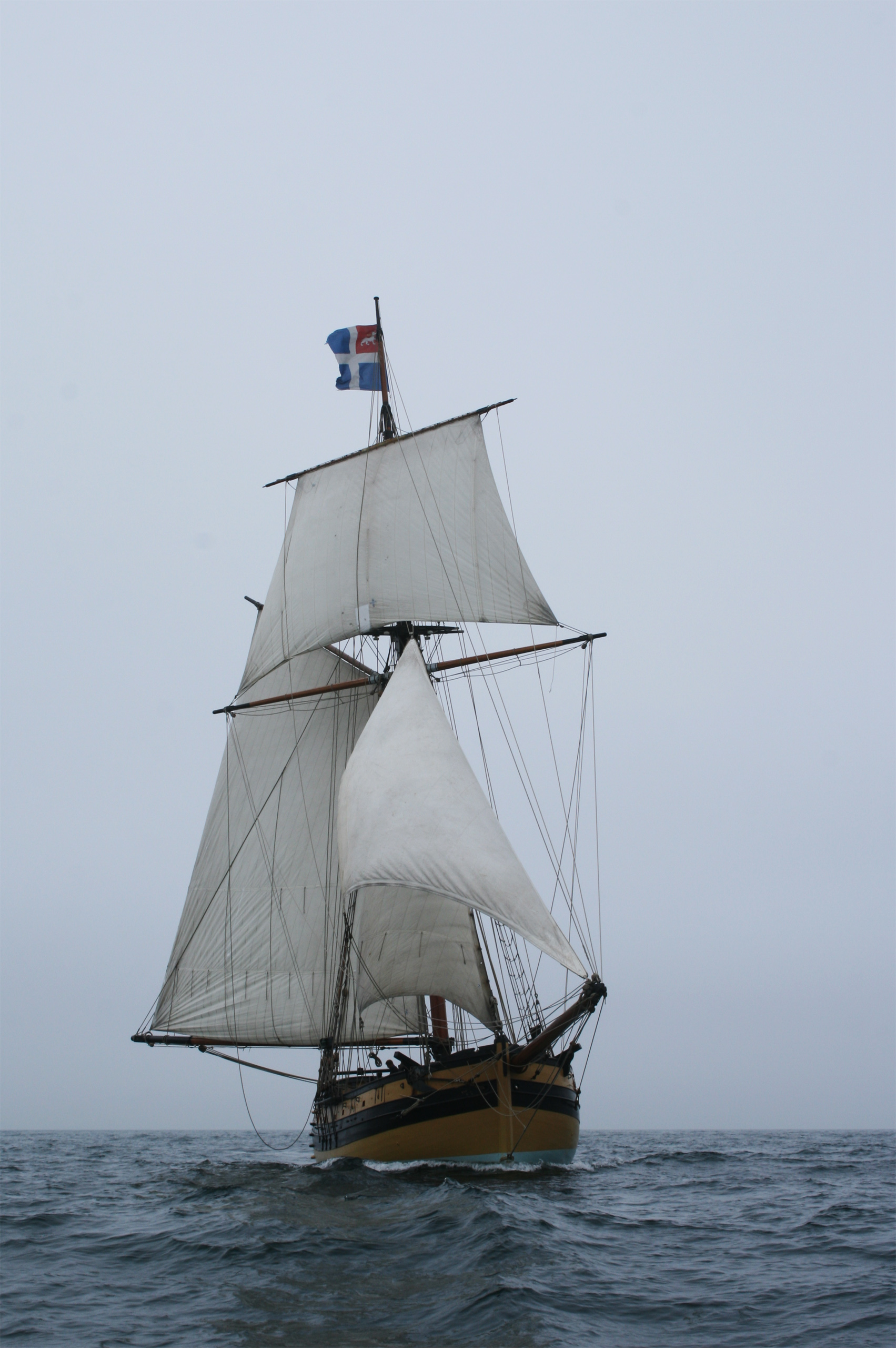 Le Renard, côtre à hunier du corsaire malouin Robert Surcouf.